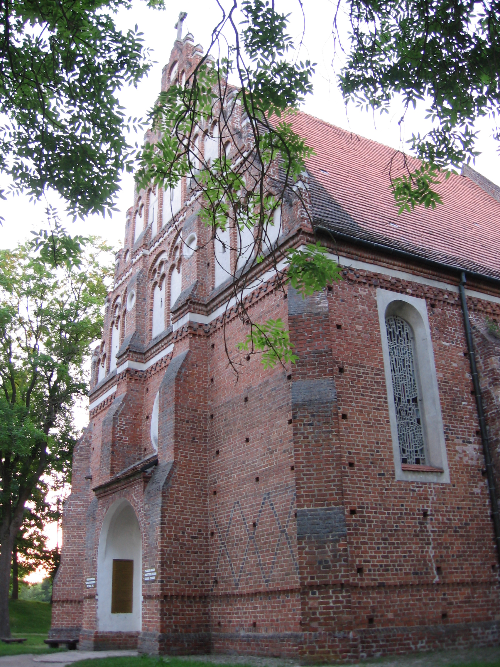 Zespół zamkowy (Kodeń)